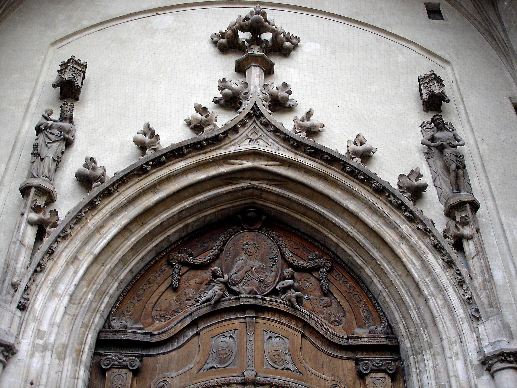 Figuren am Haupteingang